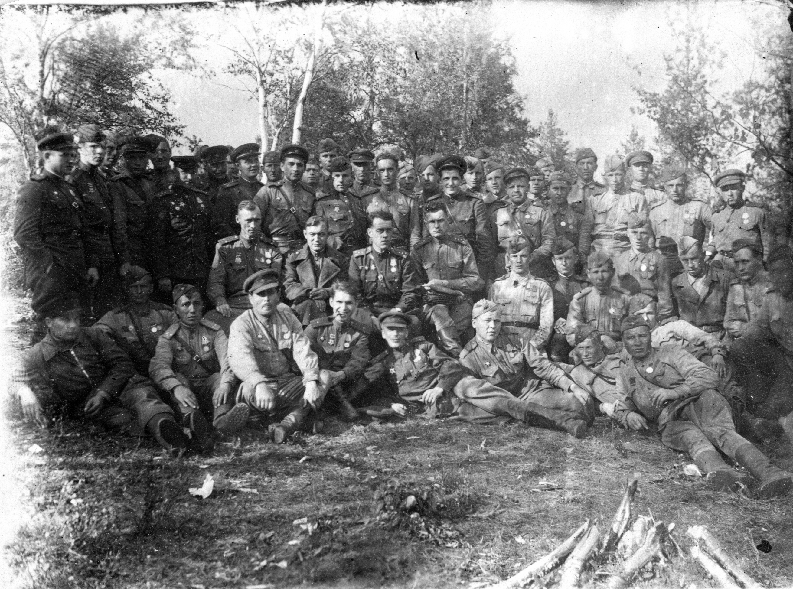 174 Минометный Красносельский дважды Краснознаменный Полк РГК (174 МКс2КрП РГК); Командир подполковник Киргетов Исаак Ананьевич. Август 1943г.